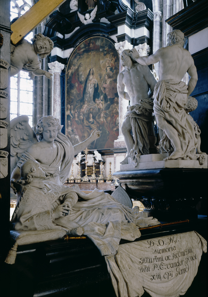 Sint-Baafskathedraal, Gent ontwerp van Louis Cnudde, Praalgraf van Philippus Erardus Van Der Noot, 1719-1720/1730; inv: 241